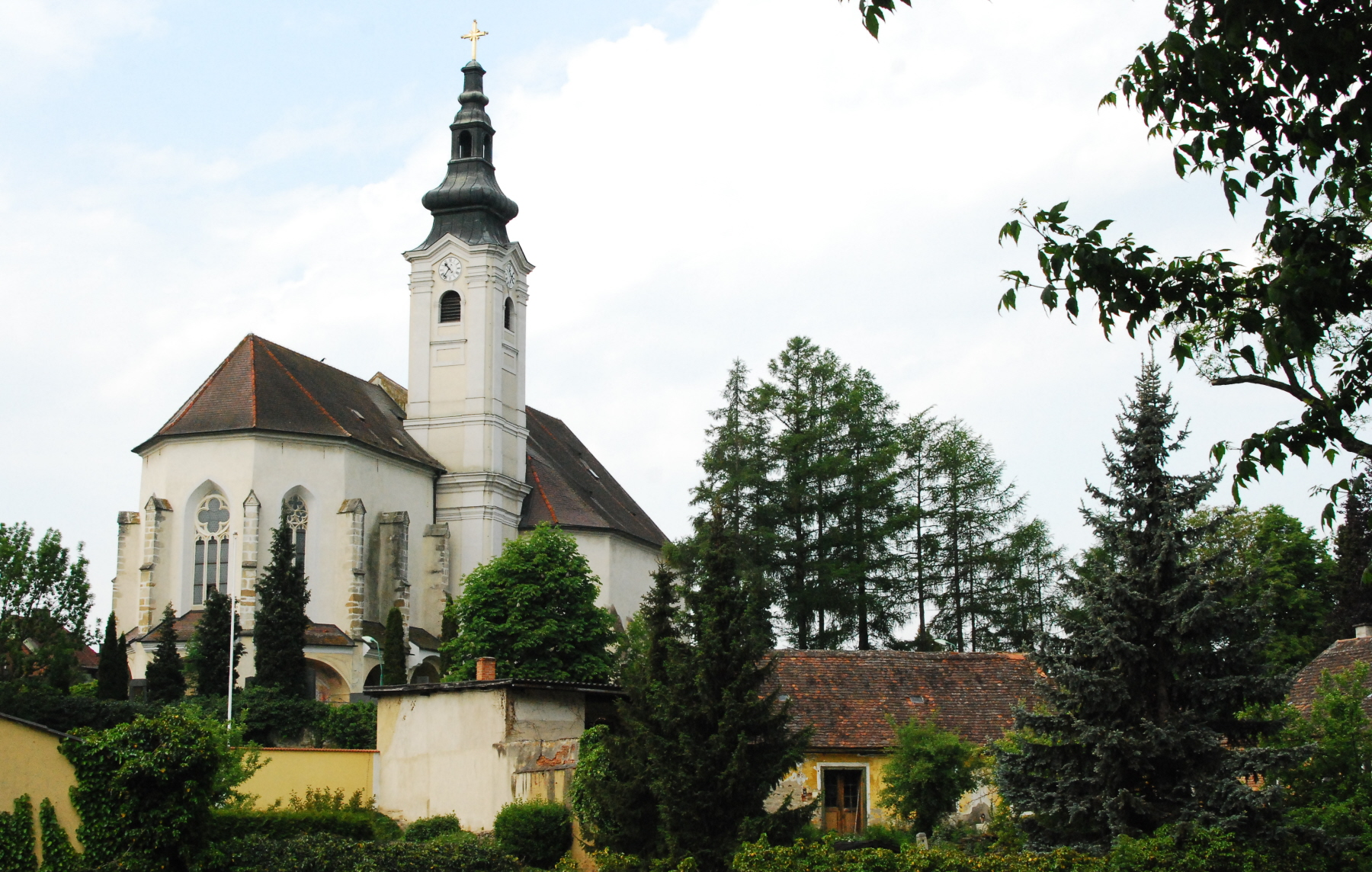 Pfarrkirche Sankt Stephan in Horn in Niederösterreich